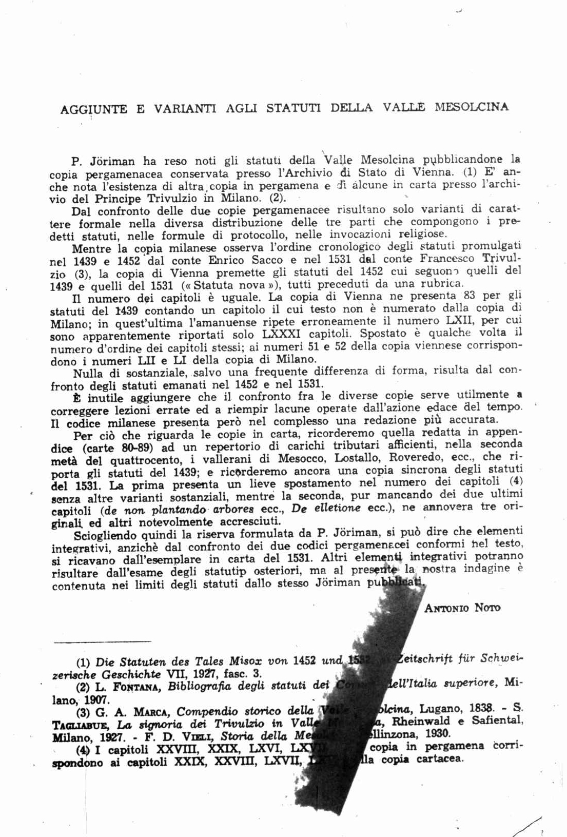 pagina 1